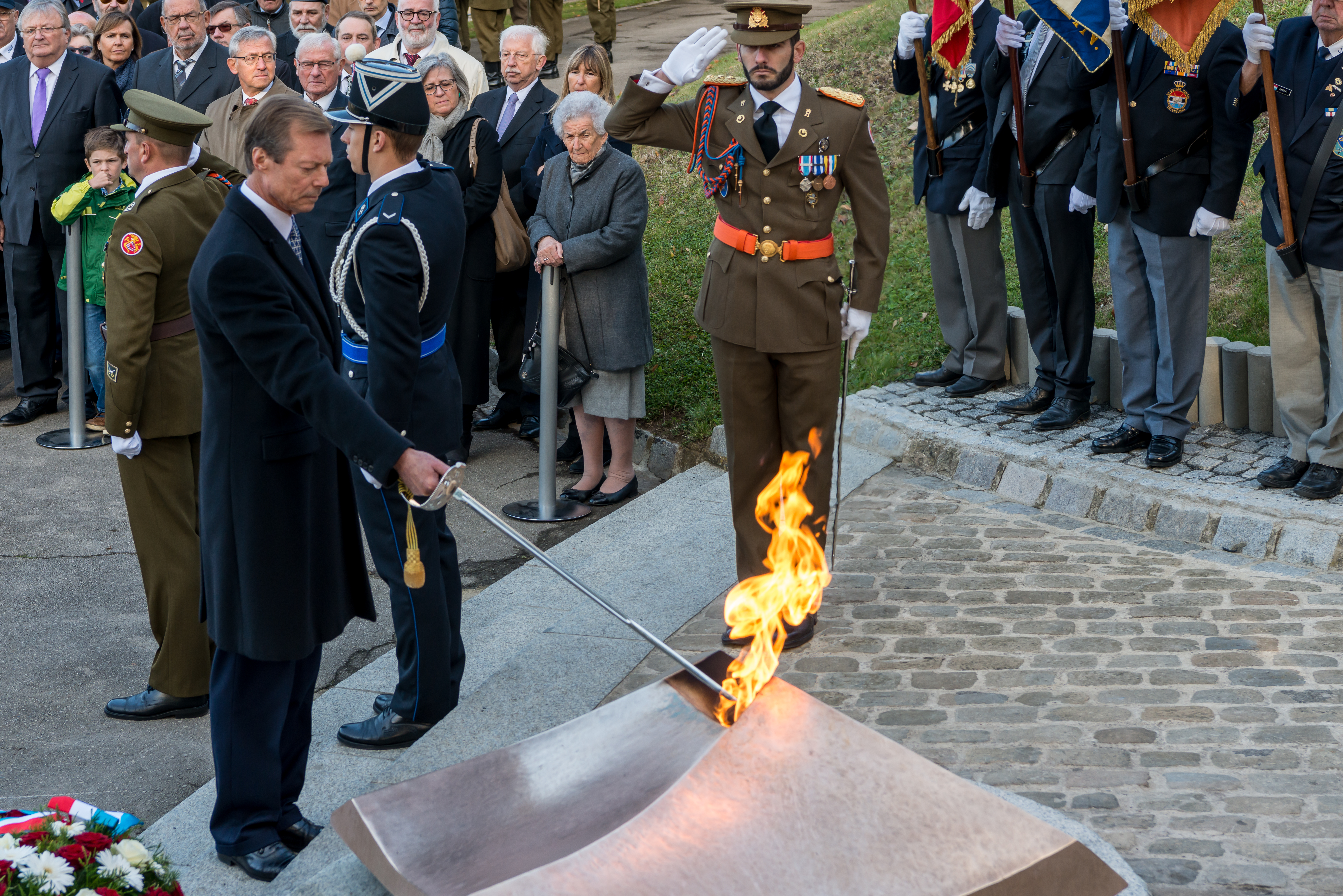 D'Journée de la commémoration nationale erënnert un d'Lutte vum Lëtzebuerger Vollek géint d'Nazi-Okkupatioun am Zweete Weltkrich. D'Commemoratioun ass am Oktober, um Sonnden deen am notse beim 10. Oktober läit. Se erënnert domat un den Echec vun der Personenstandsaufnahme vum 10. Oktober 1941. Feierlechkeete ginn a ville Gemengen ofgehal, an der Stad Lëtzebuerg sinn et der gläich dräi: Beim Nationalmonument vun der Lëtzebuerger Solidaritéit um Kanounenhiwwel, bei der Gëlle Fra op der Constitutiounsplaz a beim Hinzerter Kräiz um Nikloskierfecht. Um Kanounenhiwwel huet de Grand-duc den 9. Oktober 2016 e Kranz néierleeë gelooss an d'Erënnerungsflam vrum Monument raniméiert. No der Heemecht huet hien zesumme mam Chamberpresident, dem Premier an der Stater Buergermeeschtesch d'Monument besicht. Mat der Begréissung vun de Fändeldréier, de Vertrieder vun de patrioteschen Organisatiounen a vun den Holocaust-Affer, den auslänneschen Ambassadeuren, den Autoritéite vu Staat a Gesellschaft an och de Studente vum Stater Kolléisch an der Universitéit goung d'Zeremonie hei zu Enn.